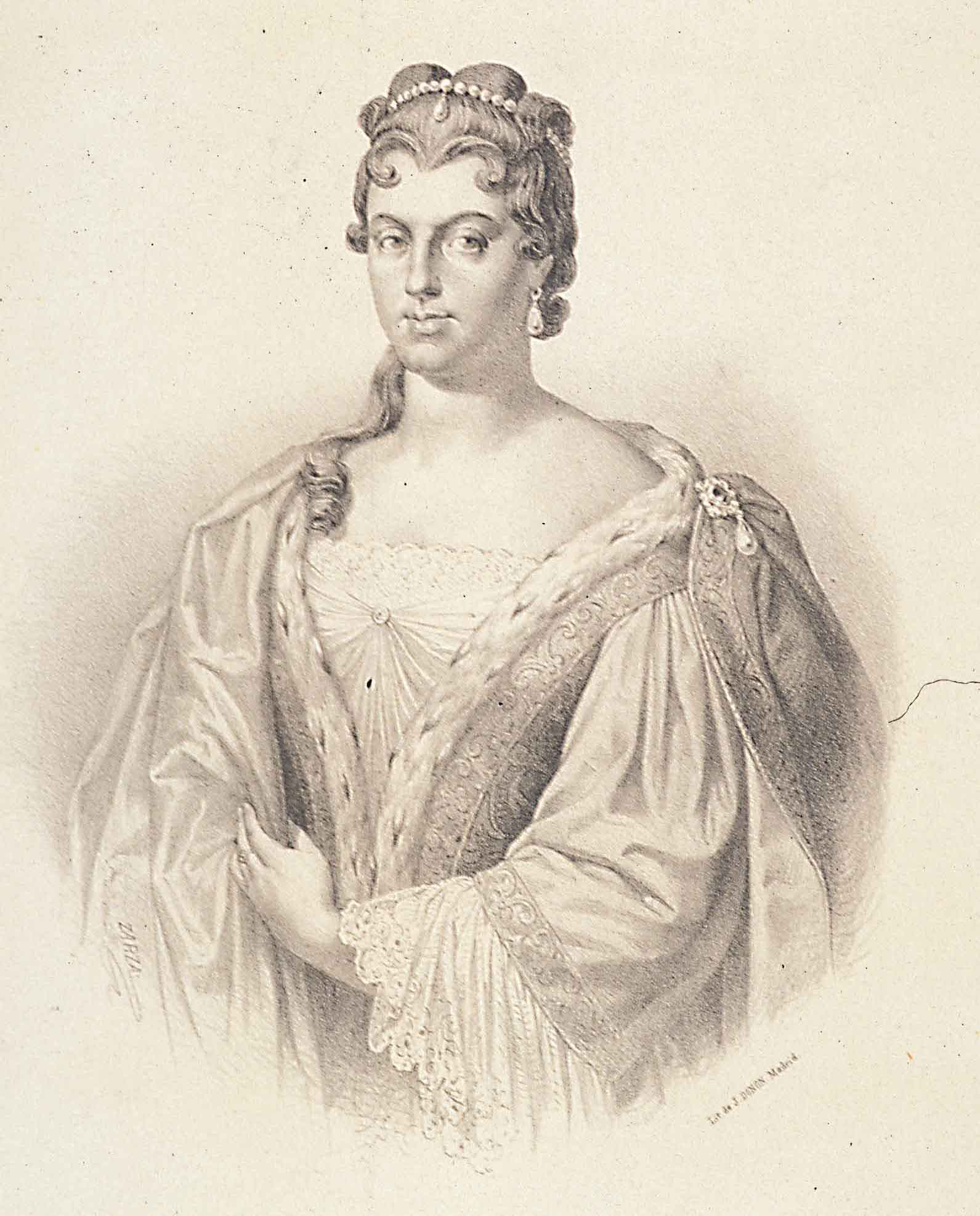 Marie Anne de La Trémoille, die Princesse des Ursins